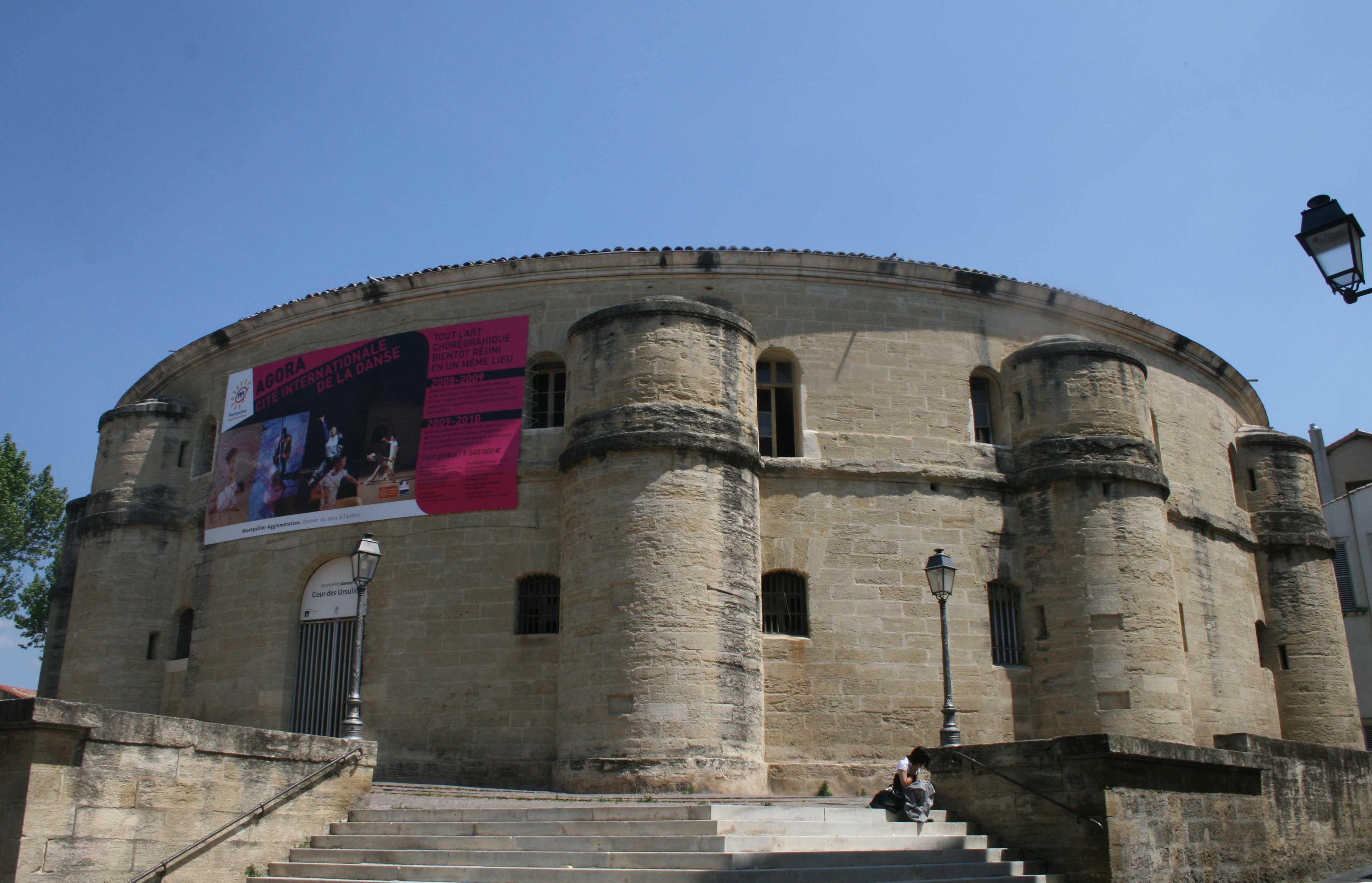 Convent de les ursulines, a Montpellier. Convertit en espai d'investigació i creació de dansa.